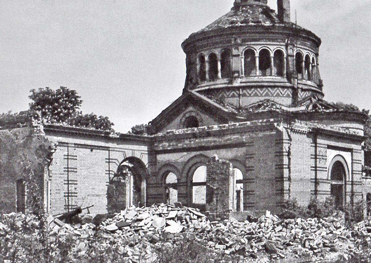 Zerstörte Leichenhalle und beschädigte Trauerkapelle auf dem Neuen Johannisfriedhof Leipzig 1946